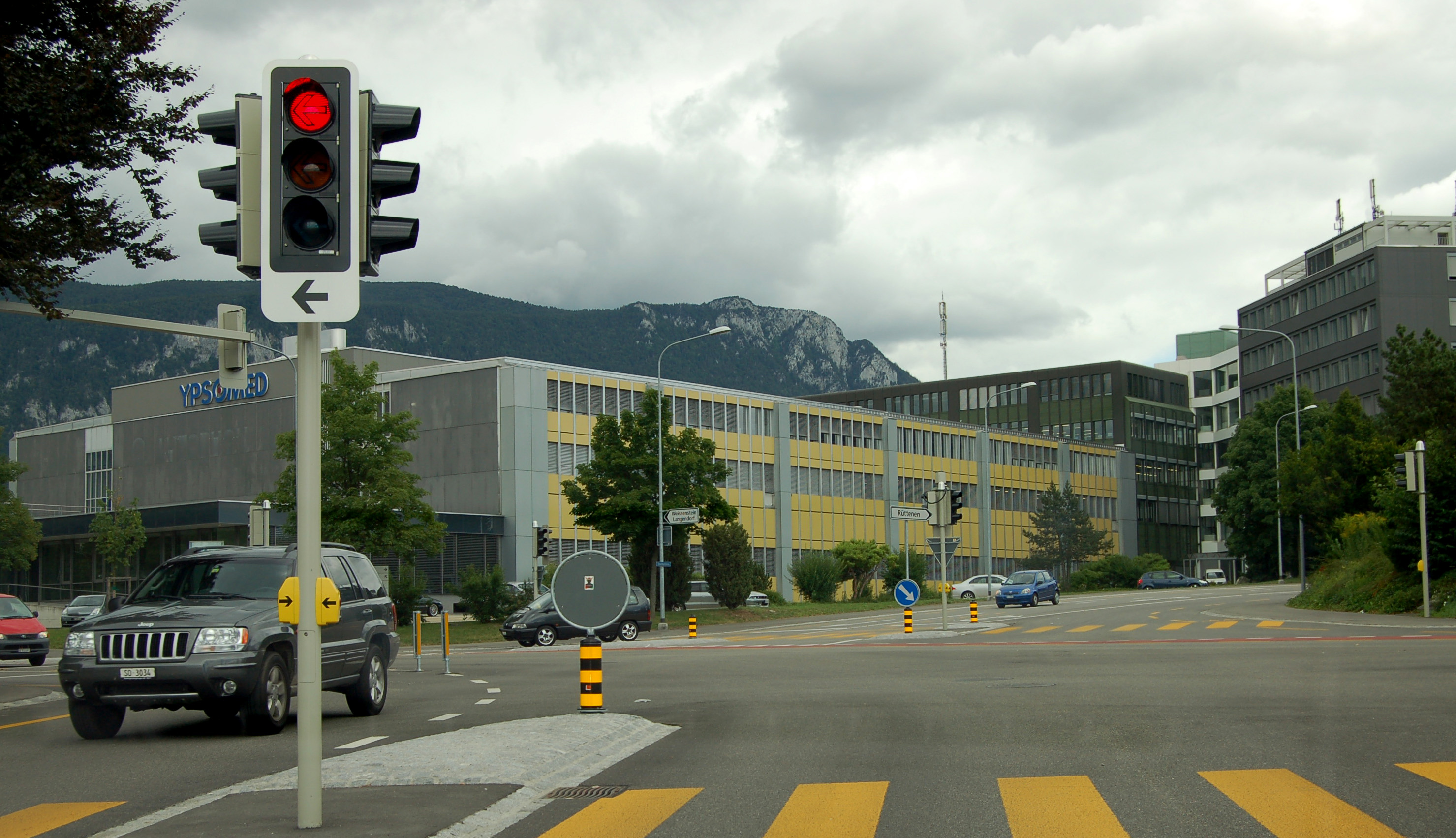 Ypsomed in Solothurn, früherer Standort von Ascom und davor Autophon.